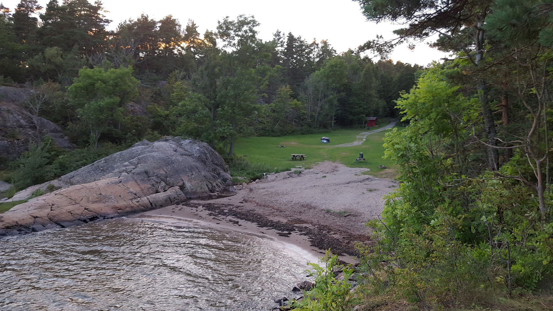 Hulvik